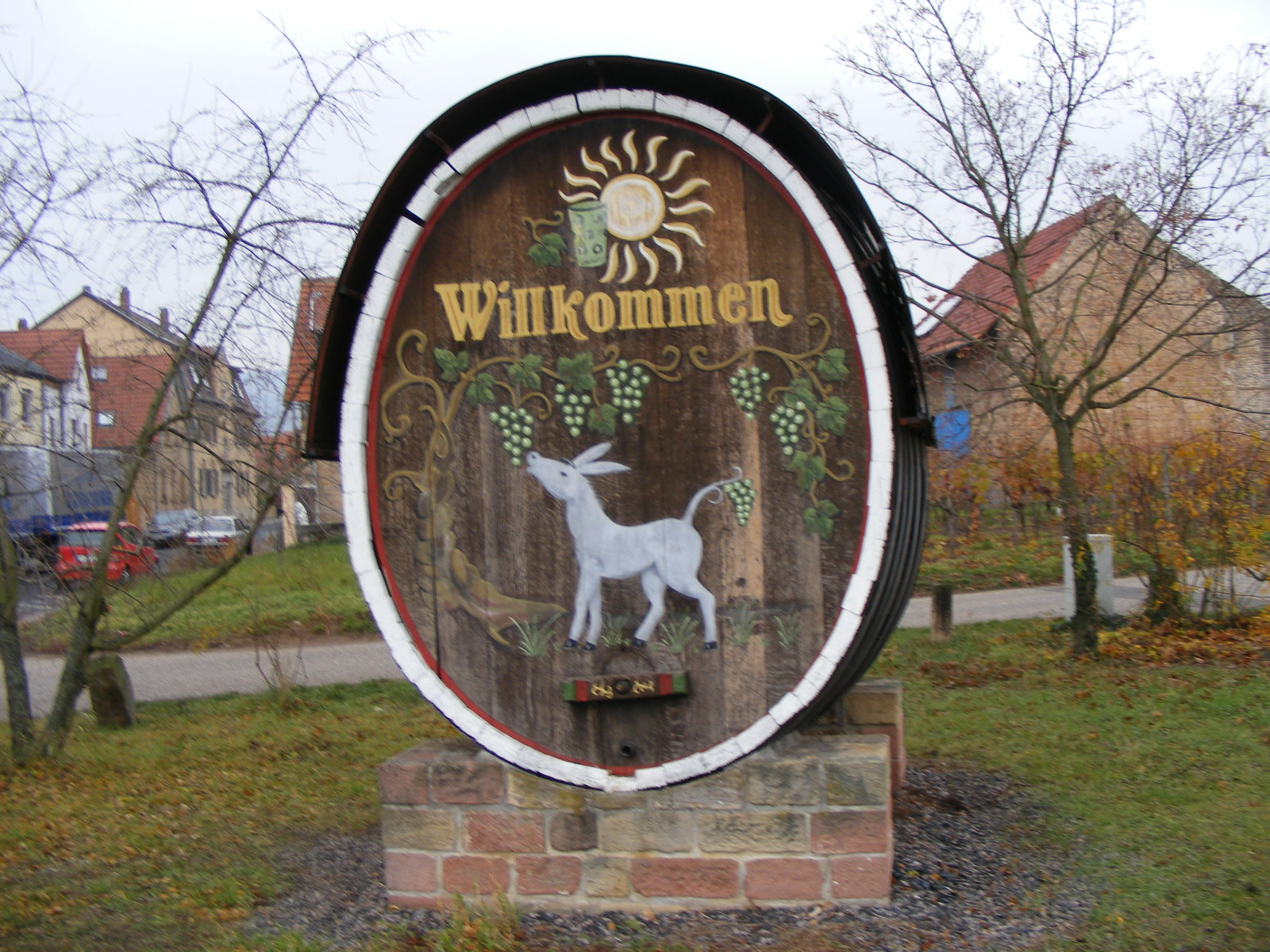 Mußbach, Esel-Darstellung am Ortseingang, s. a. Mußbacher Eselshaut